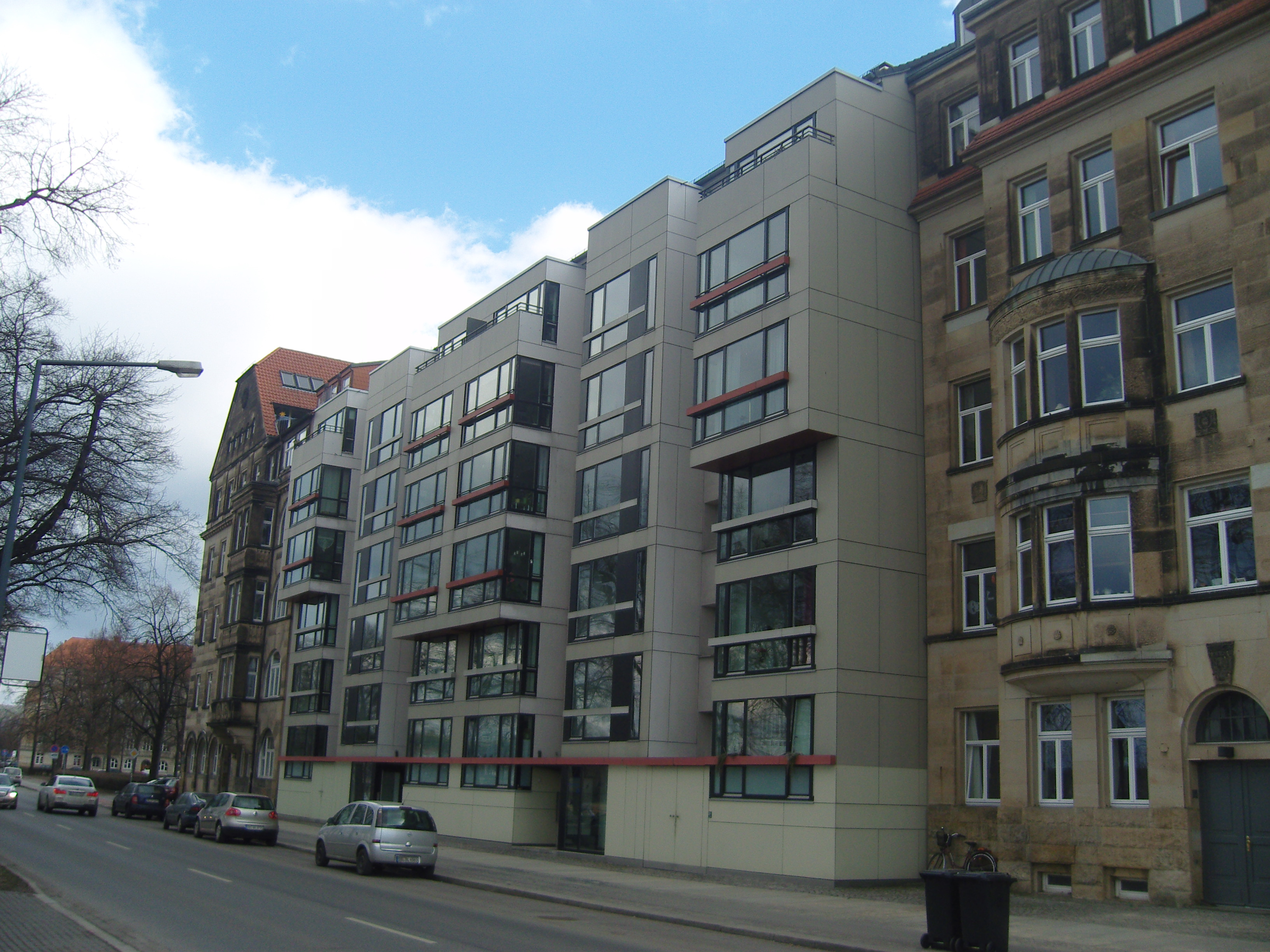 Wohnhaus am Käthe-Kollwitz-Ufer 21/22 in Dresden, erbaut 1974